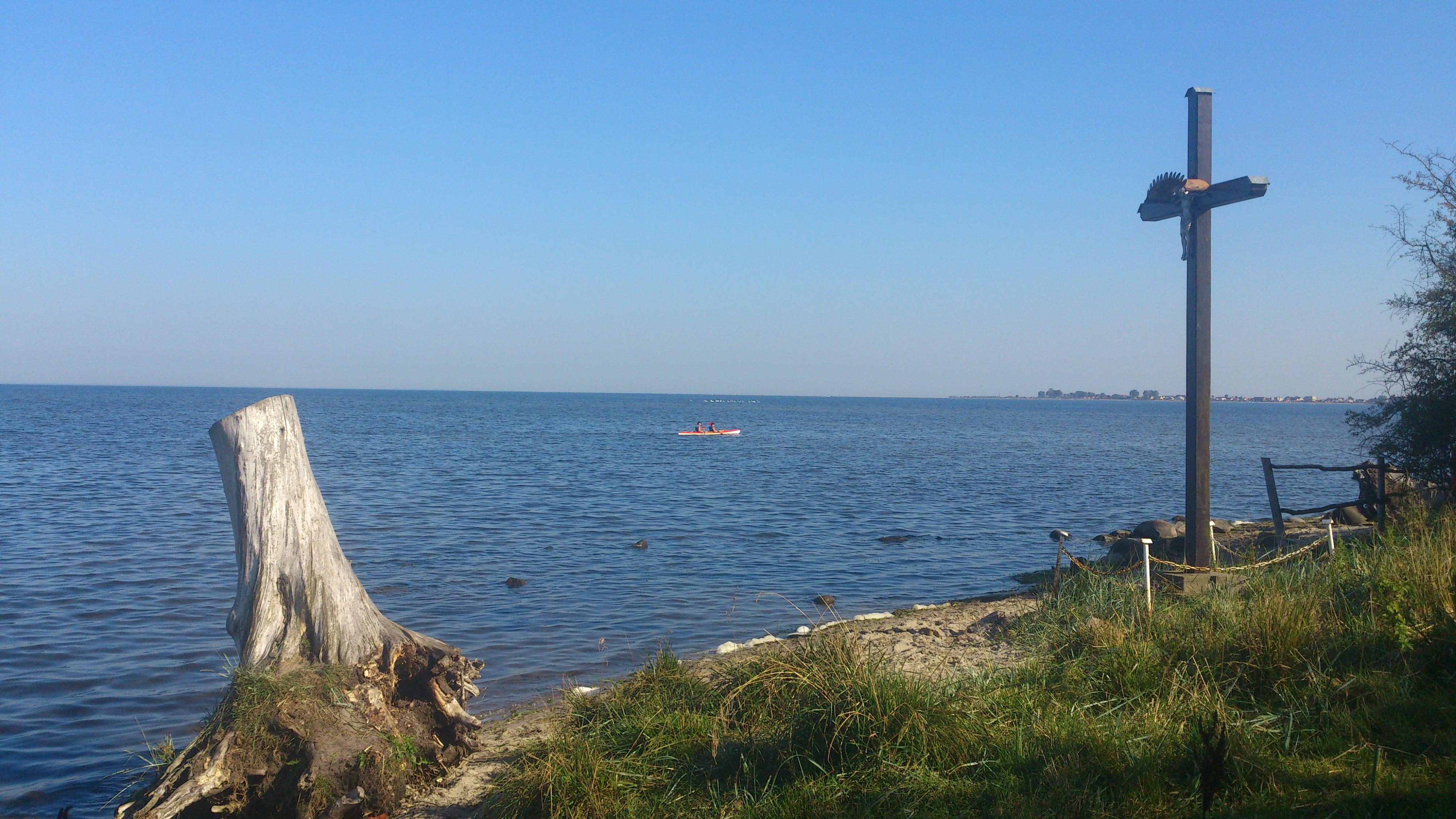 Widok na charakterystyczny krzyż będący jedynym niezniszczonym obiektem po osadzie Beka